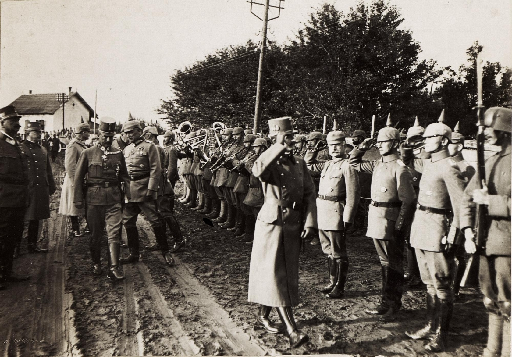 S.M.an der rumänischen Front 4.9.17.